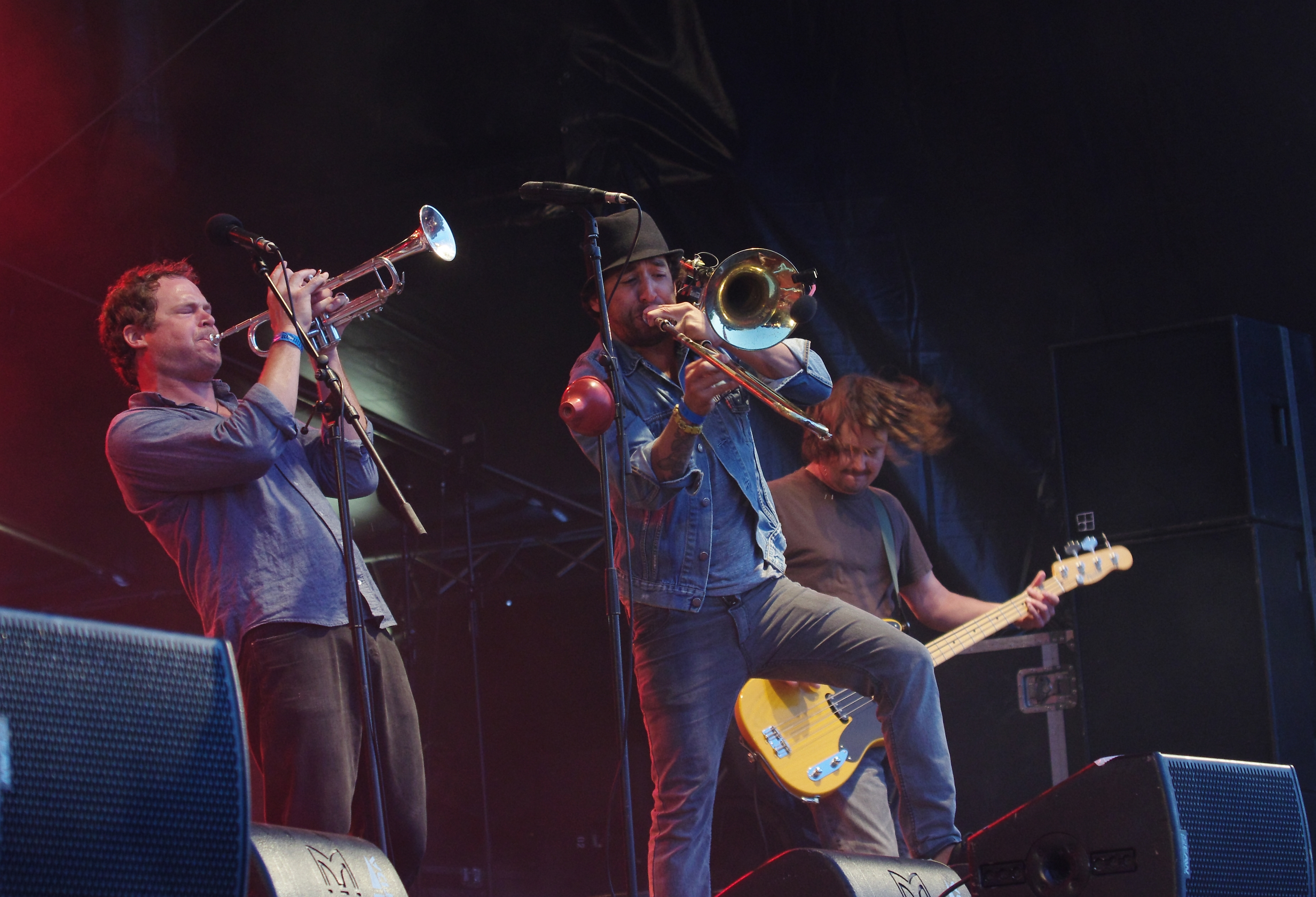 Mad Caddies beim Ruhrpott Rodeo 2013. Besetzung: Chuck Robertson - Vocals, Guitar Sascha Lazor - Guitar, Banjo; Keith Douglas - Trumpet, Vocals; Eduardo Hernandez - Trombone; Todd Rosenberg - Drums; Graham Palmer - Bass; Dustin Lanker - Keys